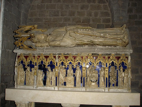 Sepulcre gòtic de Sant Narcís, a la Col·legiata de Sant Feliu de Girona